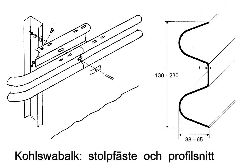 Profilskiss på en Kohlswabalk